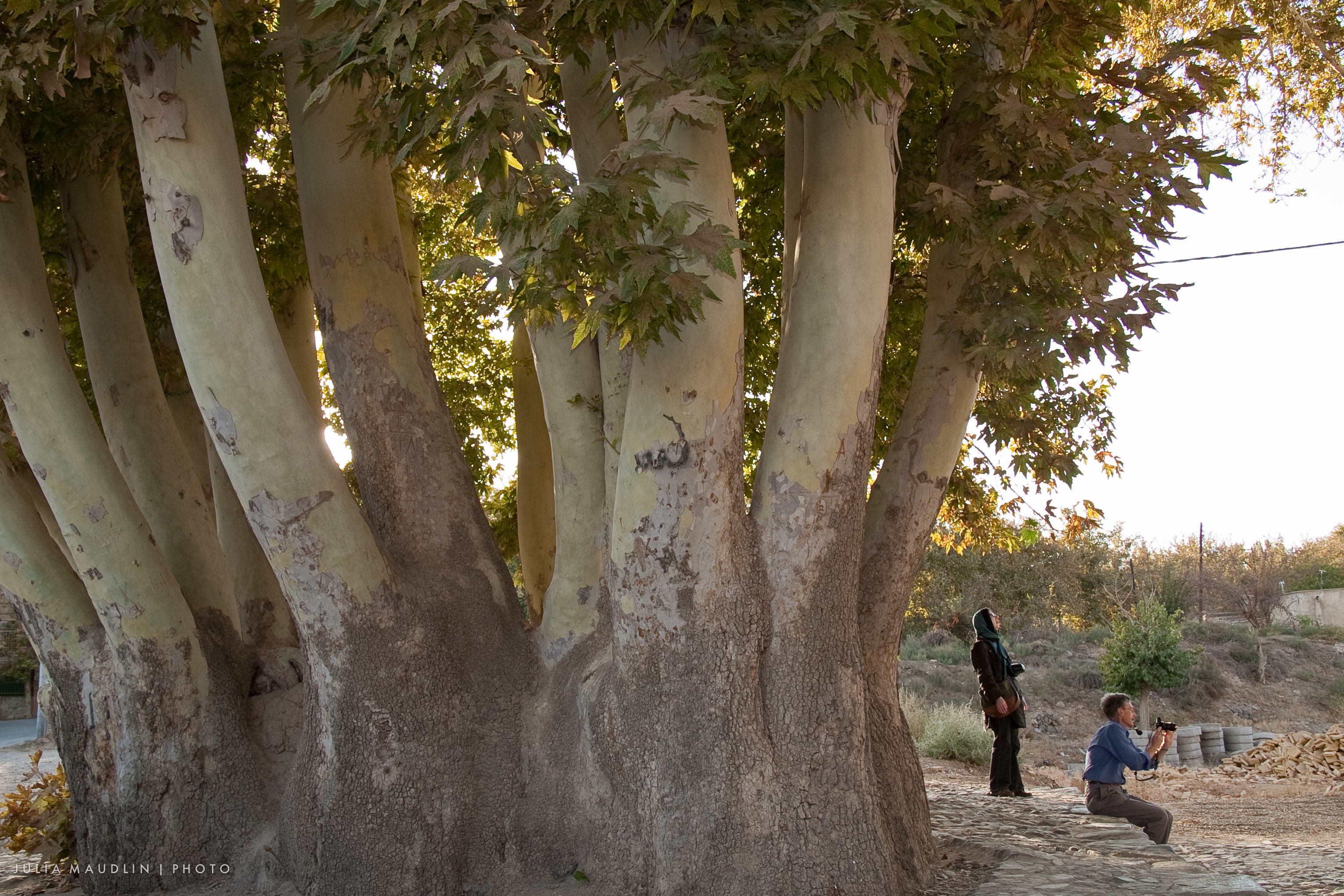 Ancient, Natanz